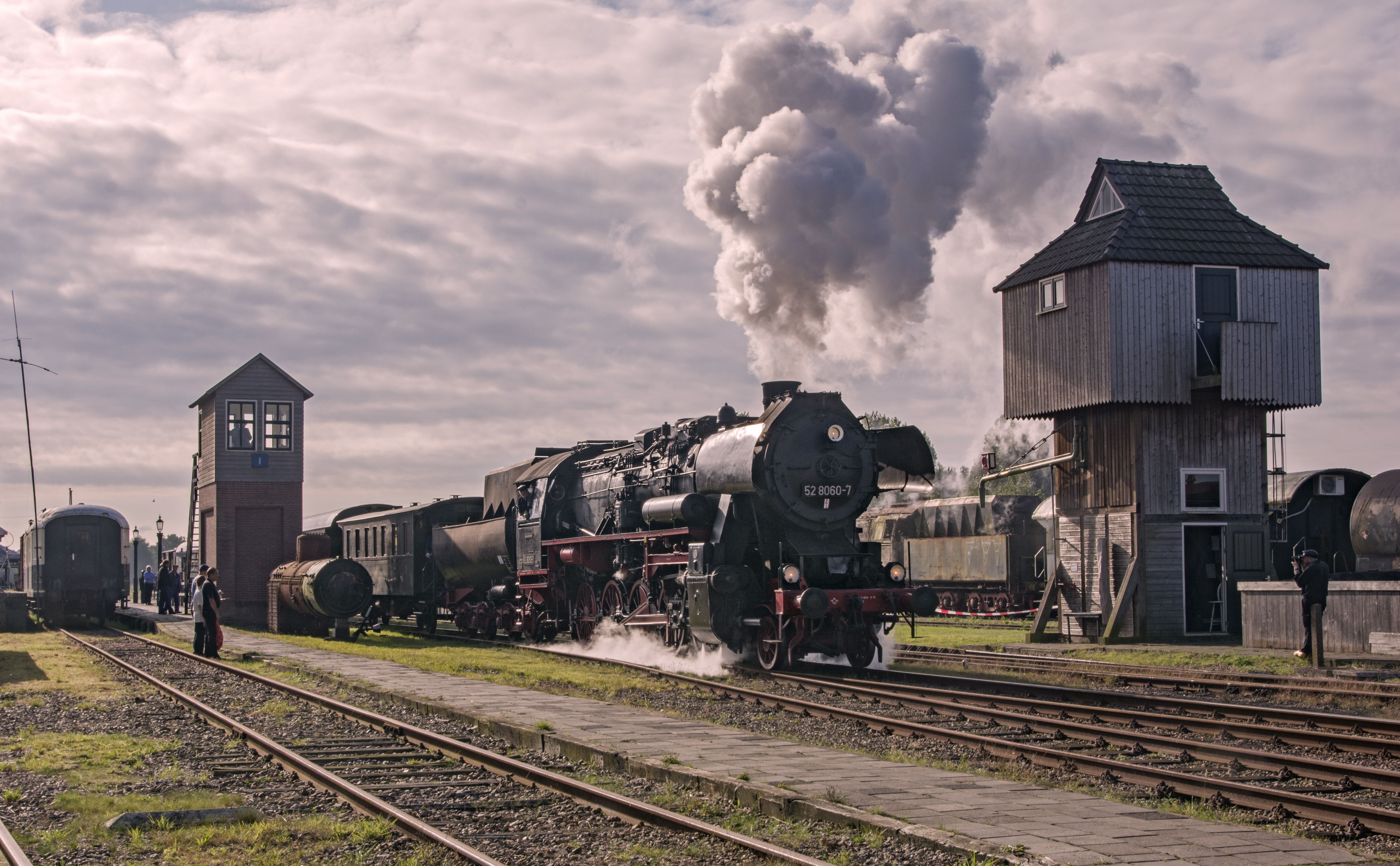 Star loc 52 8060 vertrekt hier vanaf station Stadskanaal, tijdens het stoomevenement, naar Veendam.